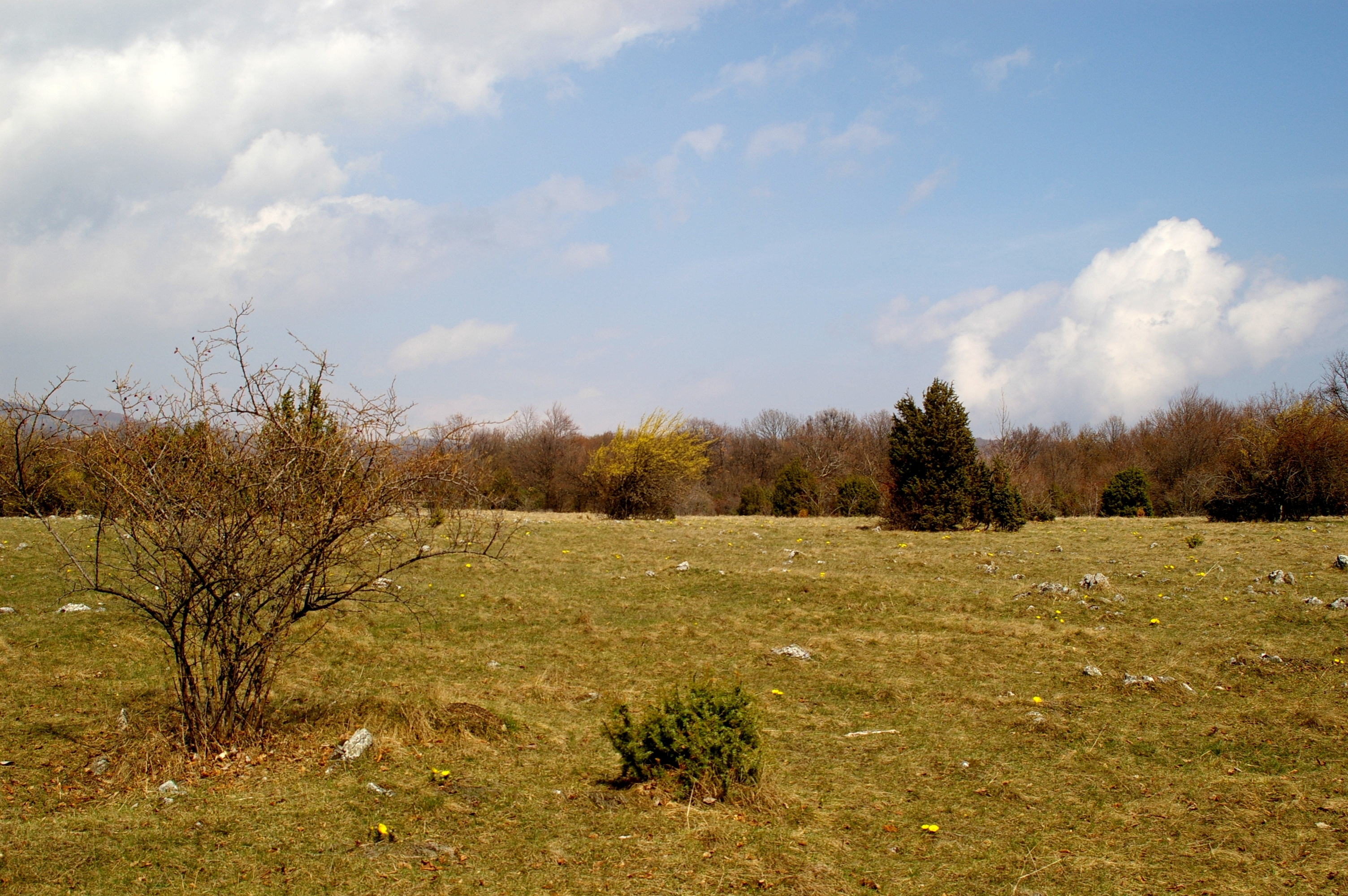 Na Zadielské planině